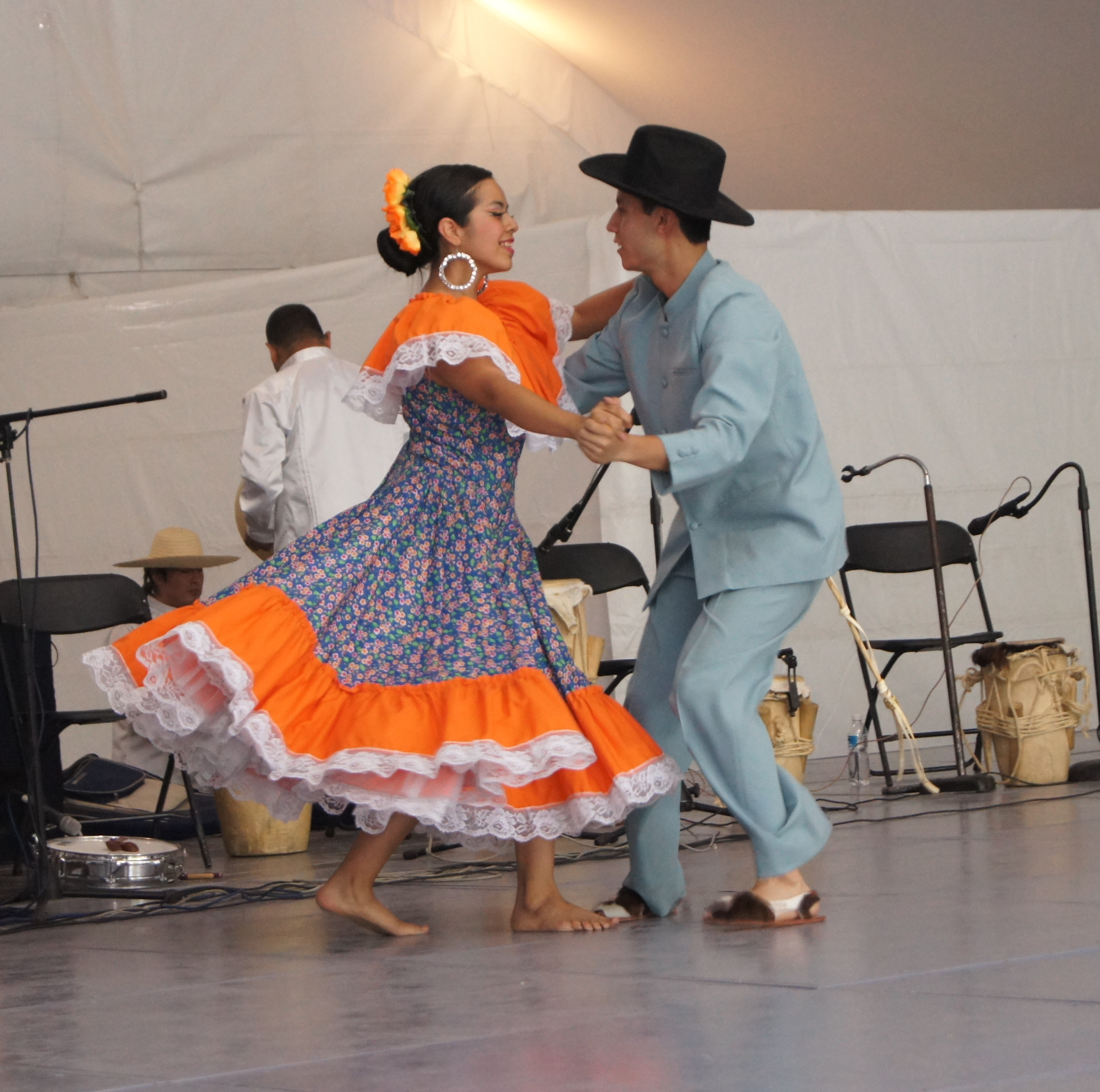 Demonstración de baile folclórico de Colombia durante el evento “Yo Amo Colombia” en ITESM Campus Ciudad de México [1]